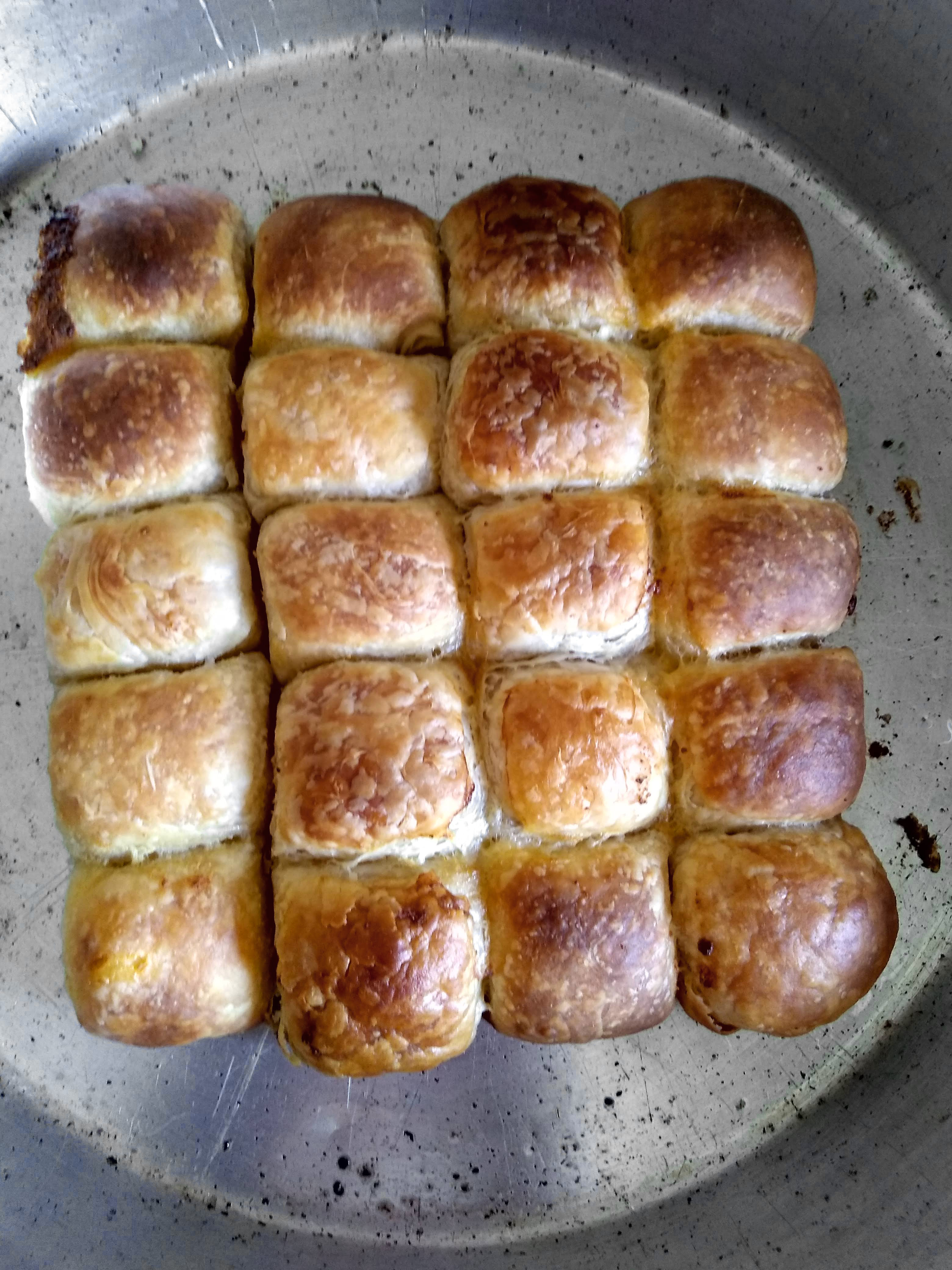 Srpski (latinica): Pazarske mantije - tradicionalno jelo i specijalitet Novog Pazara i Sandžaka